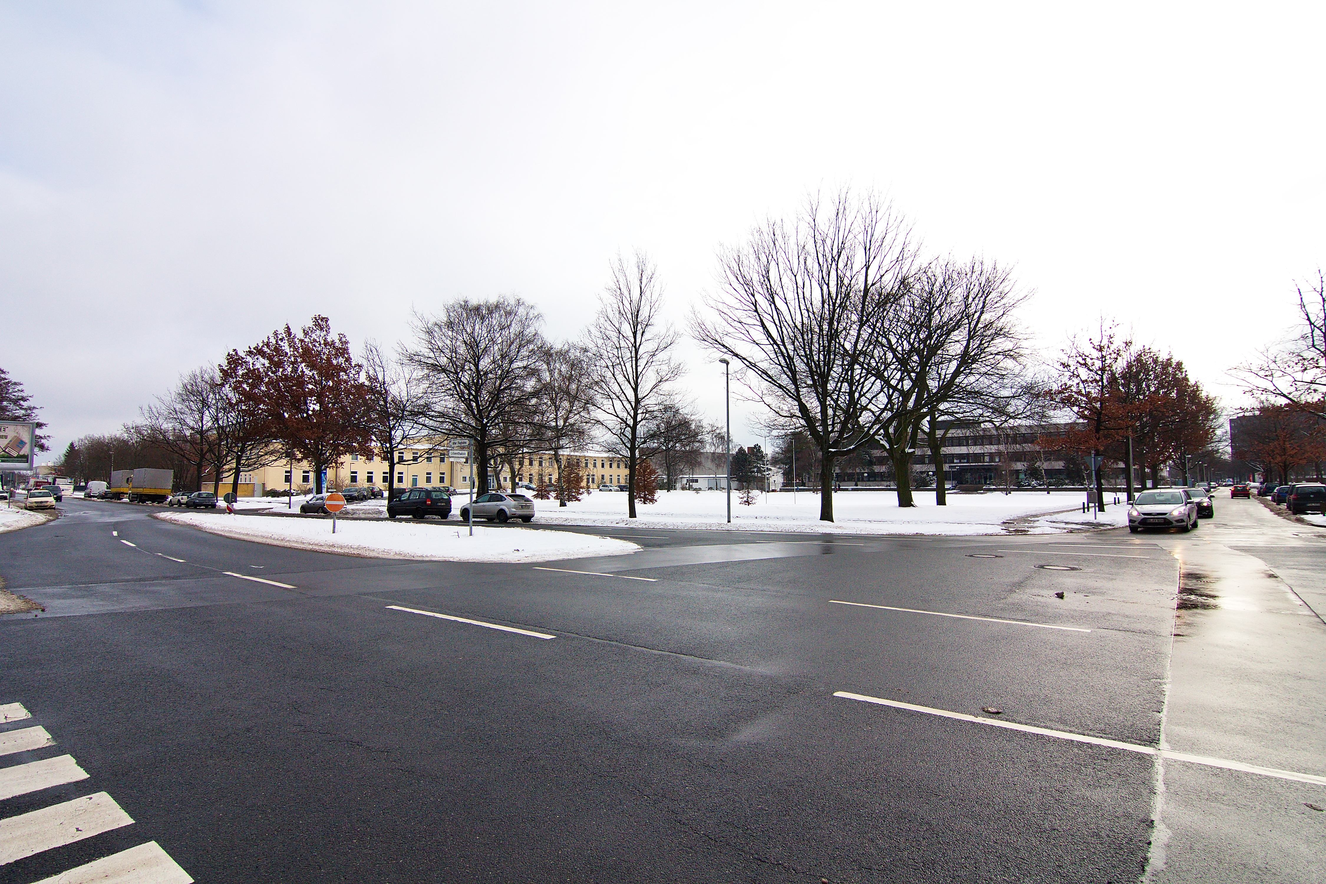 Ortsbild vom Alter Flughafen in Vahrenheide (Hannover), Niedersachsen, Deutschland